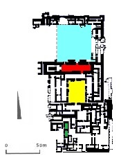 Palais nord-ouest de Kalkhu/Nimrud. Rouge : salle du trône ; bleu : cour centrale du babanu (partie publique) ; jaune : cour centrale du bitanu (partie privée).